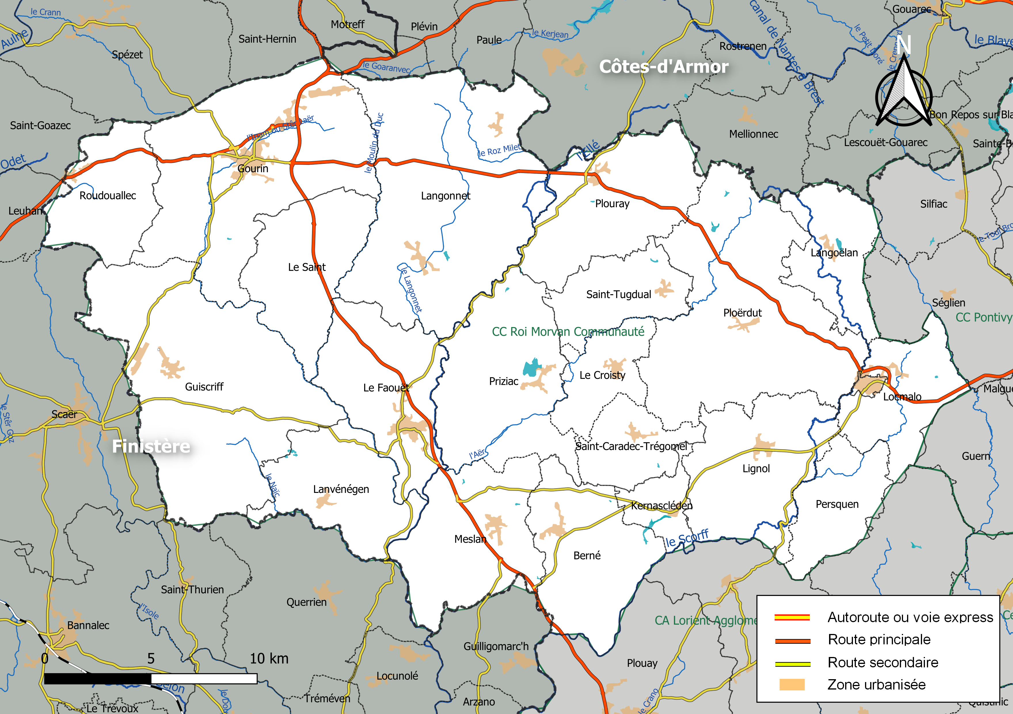 Carte géographique de la Communauté de communes Roi Morvan Communauté, département du Morbihan, France. Composition au 1er janvier 2019.